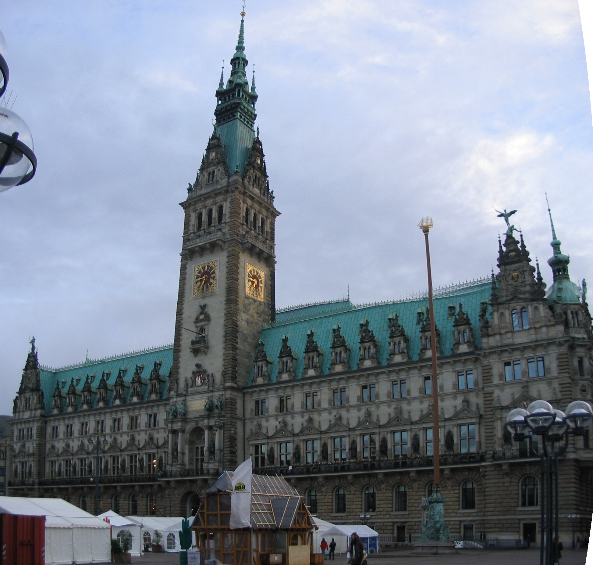 Rathaus Hamburg